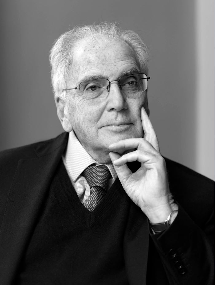 Foto personale Marco Salvatore